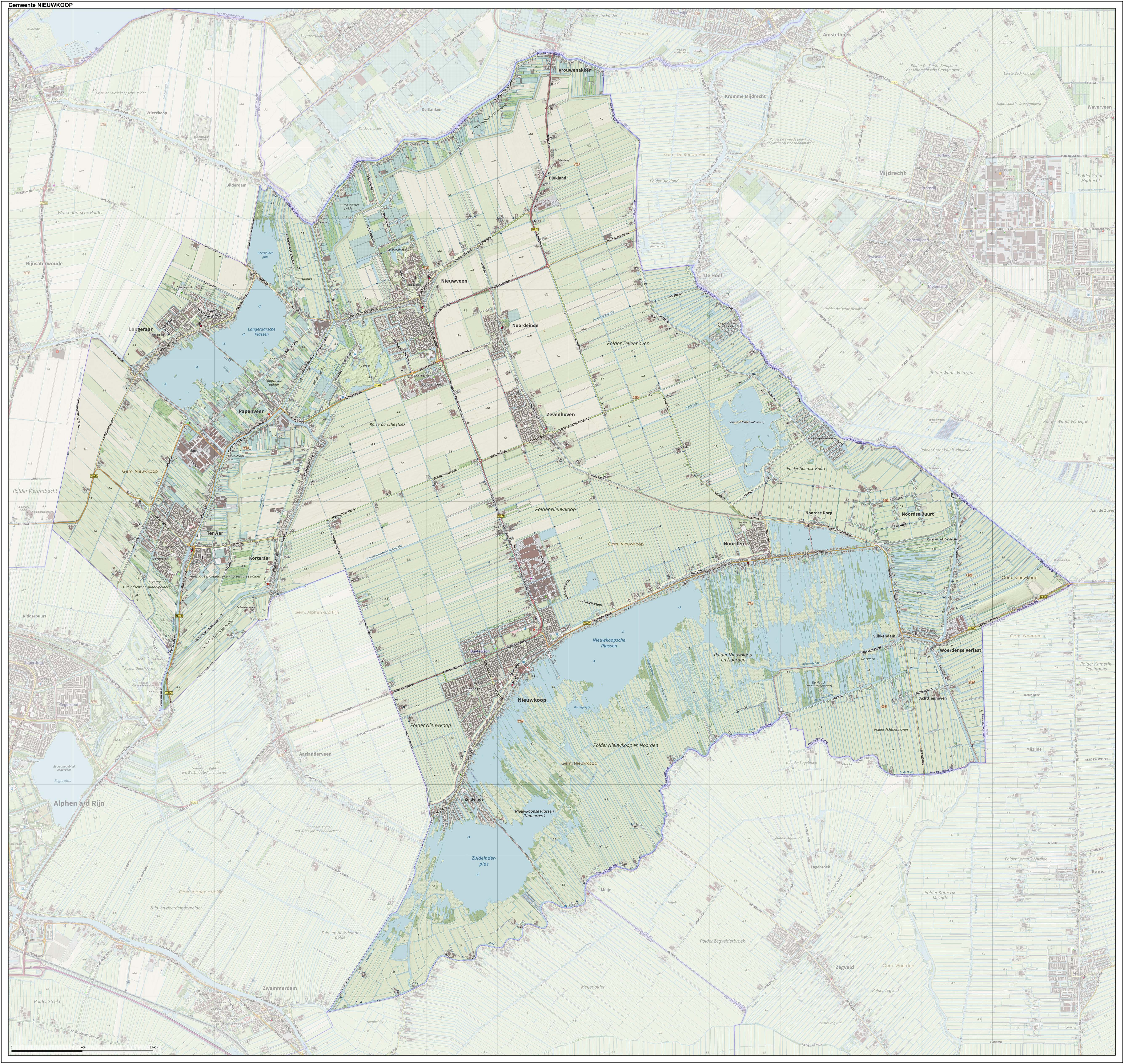 Topografische gemeentekaart. Resolutie: 400 pixels/km. Kaartbeeld samengesteld uit de open geodata van de Top10NL en Top25namen (Kadaster), Creative Commons-BY licentie. Gebouwvlakken uit open geodata BAG extract. Wegen uit de OpenStreetMap, OpenStreetMap community. Reliëfschaduw uit de Actuele Hoogtekaart AHN2. Samenstelling en kleurenschema: Jan-Willem van Aalst, met QGIS. Zie ook de Legenda.